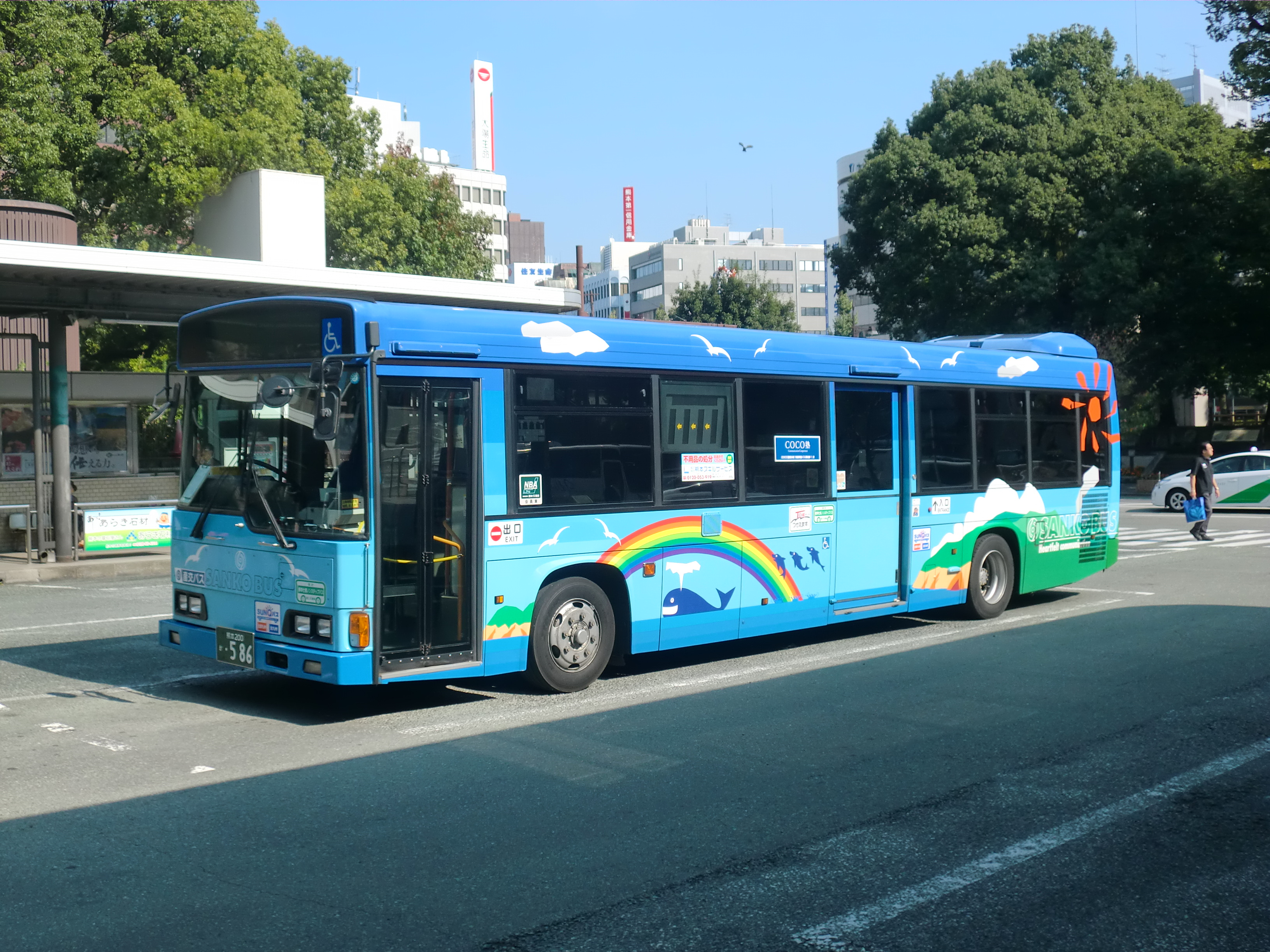 九州産交バス